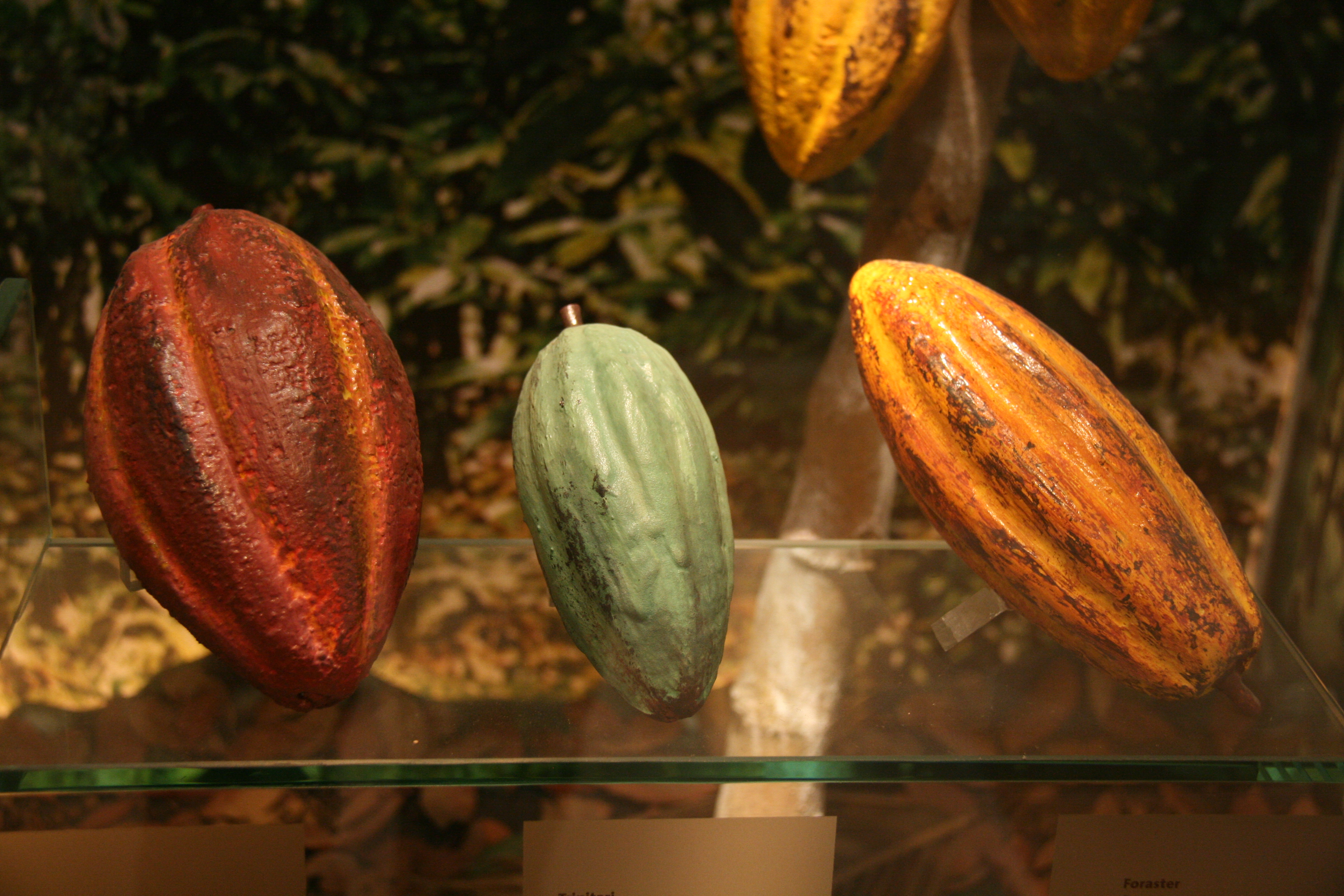 Tres variedades de Theobroma cacao (Izquierda a derecha): Forastero Trinitario Criollo